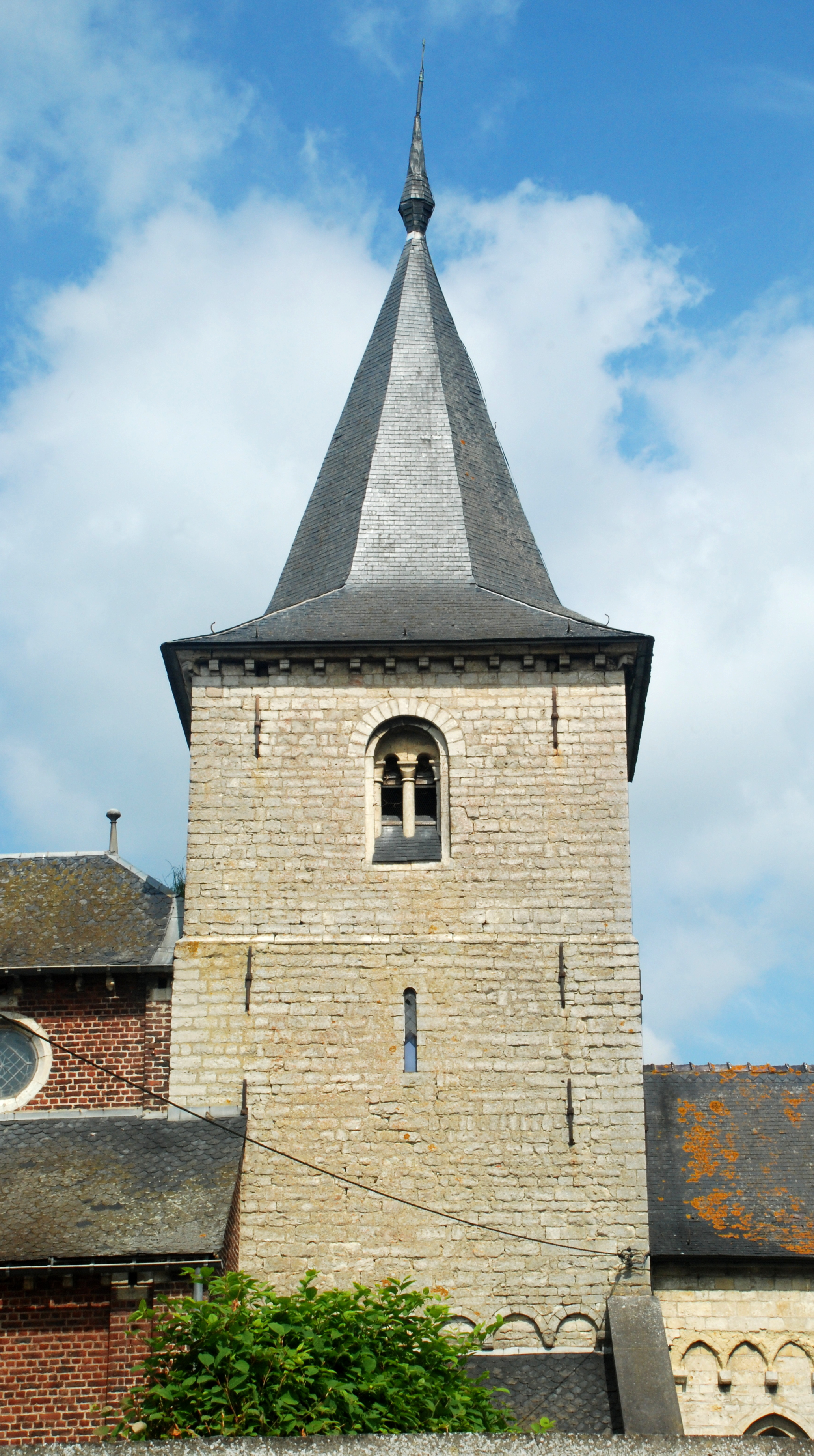 Belgique - Brabant wallon - Jodoigne - Église Saint-Pierre de Sainte-Marie-Geest